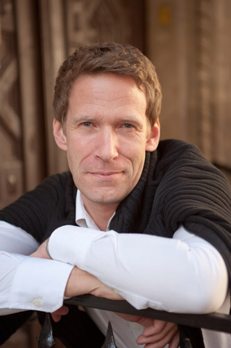 Autor Thore D. Hansen